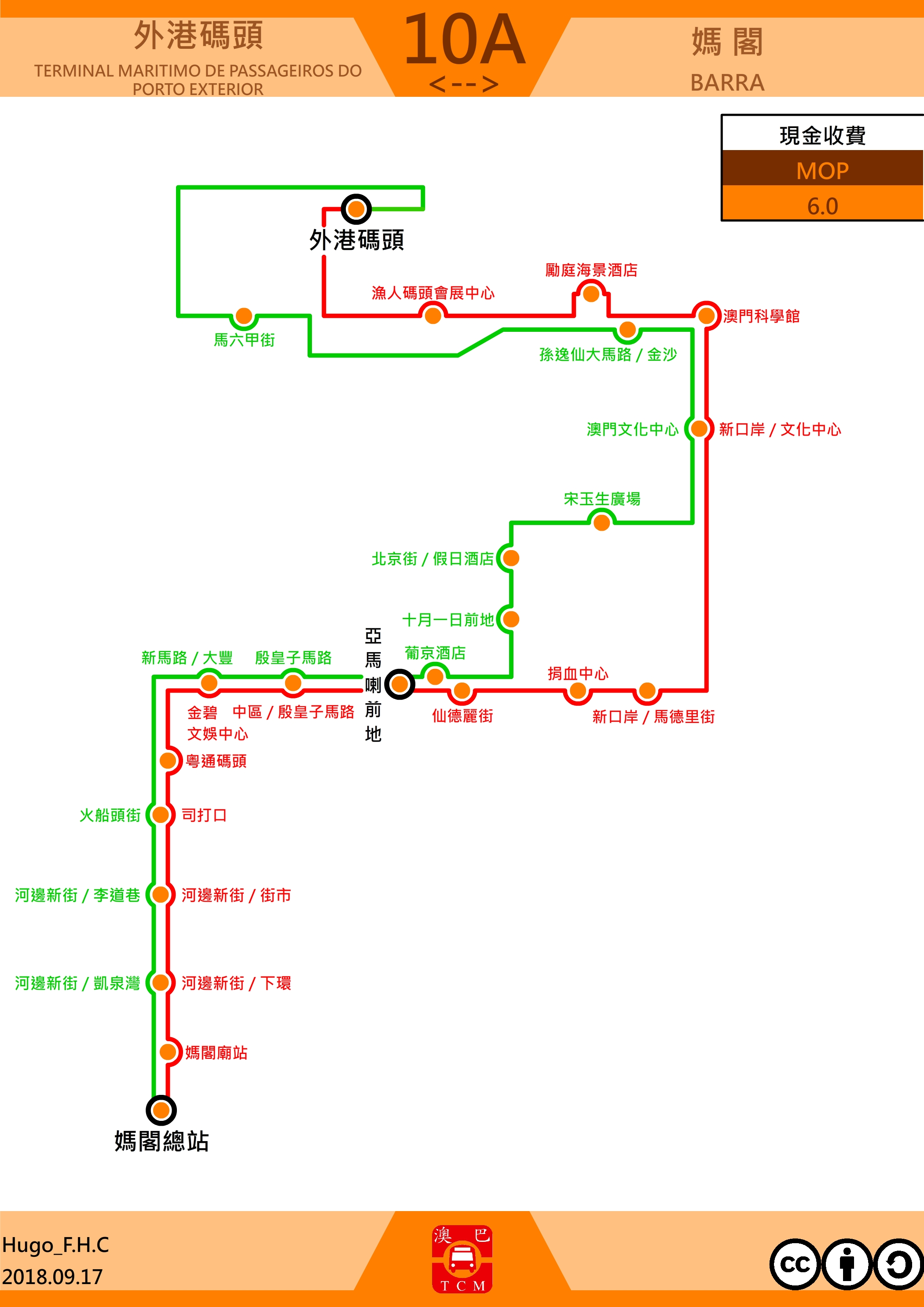 澳門巴士10A走線圖